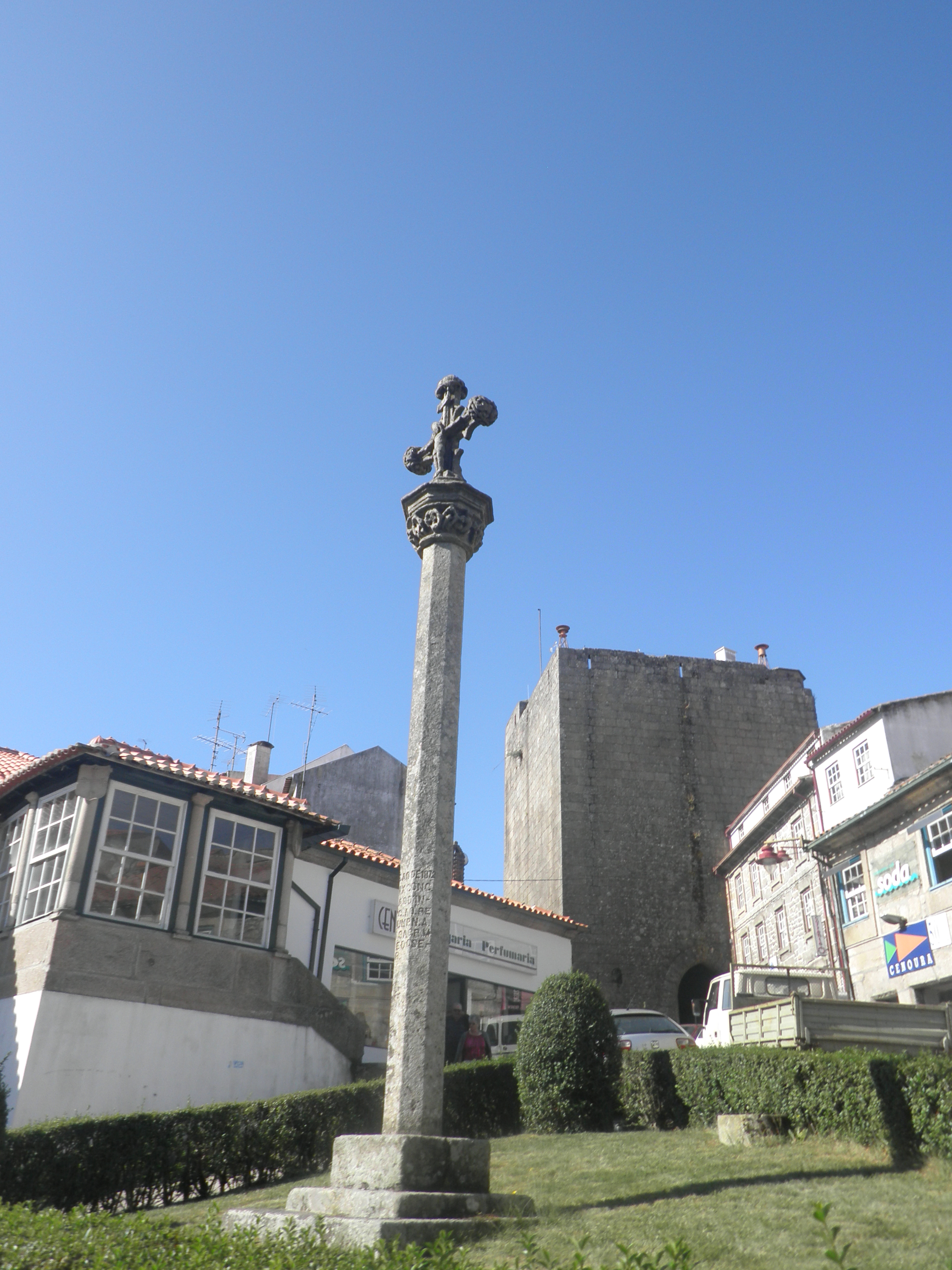 Cruzeiro ( em cima, a Trre dos Ferreiros) This file was uploaded for Wiki Loves Monuments in Portugal with the unique identifier 74994.